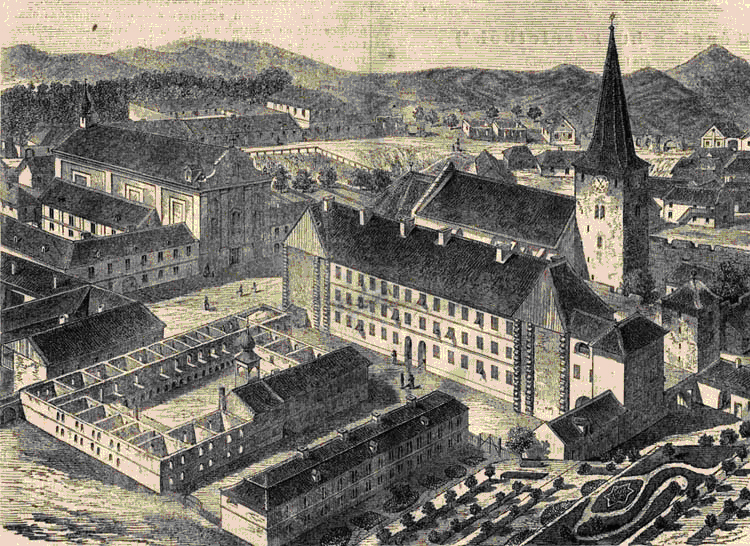 Bethlen Gábor Kollégium, Nagyenyed